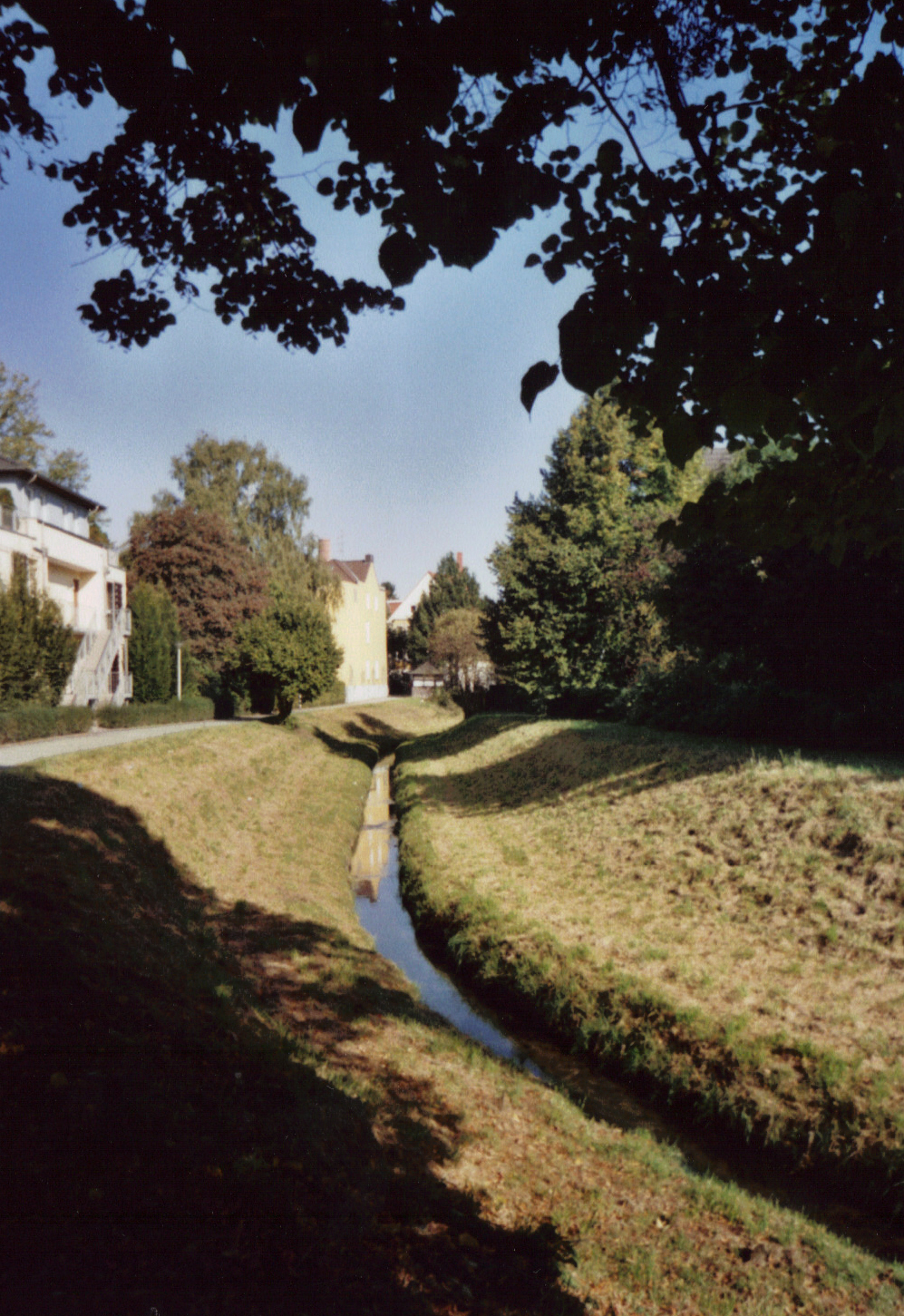 Im Mittelalter bildete der Kupferstrang, zu dem sich Trillke- und Blänkebach vereinigen, die Grenze zwischen Moritzberg und Dammstadt. Im Bild rechts des Baches Gelände der ehemaligen Dammstadt, links des Baches Gelände des ehemaligen Bergfleckens Moritzberg, heute Stadtteil von Hildesheim.